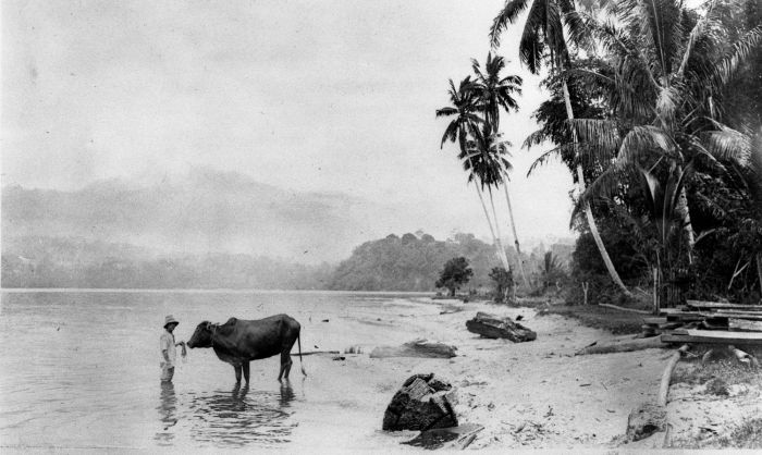 Foto. Aan het Ranau-meer in Zuid-Sumatra, augustus 1926.